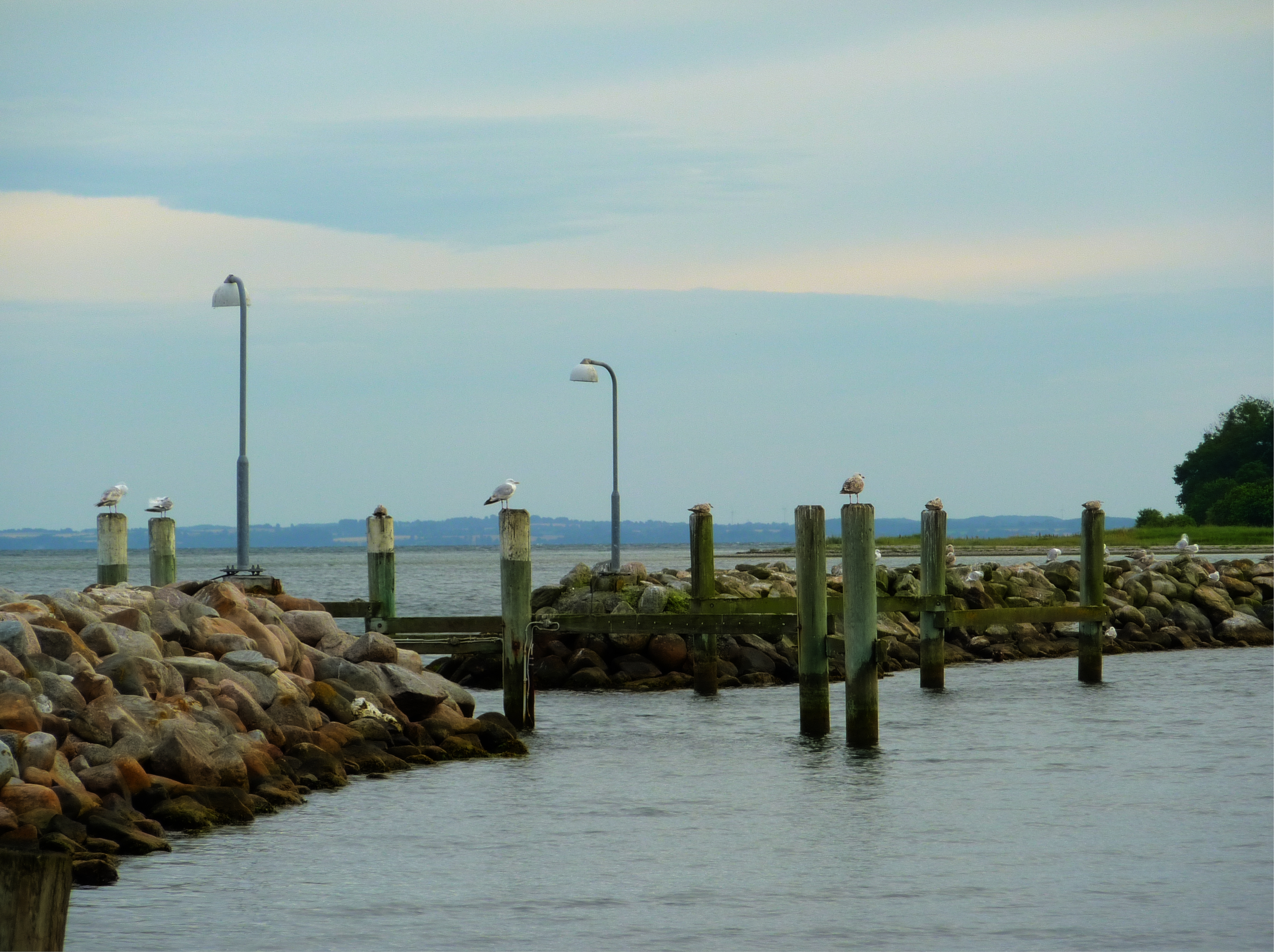 Möwen